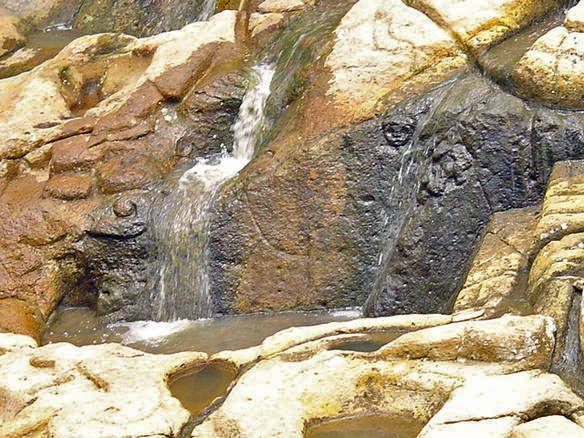 Fuente de Lavapatas of the San Agustín indian cult in Colombia